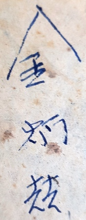 김병철 회장의 고등학교 시절 필체 1957년 전후